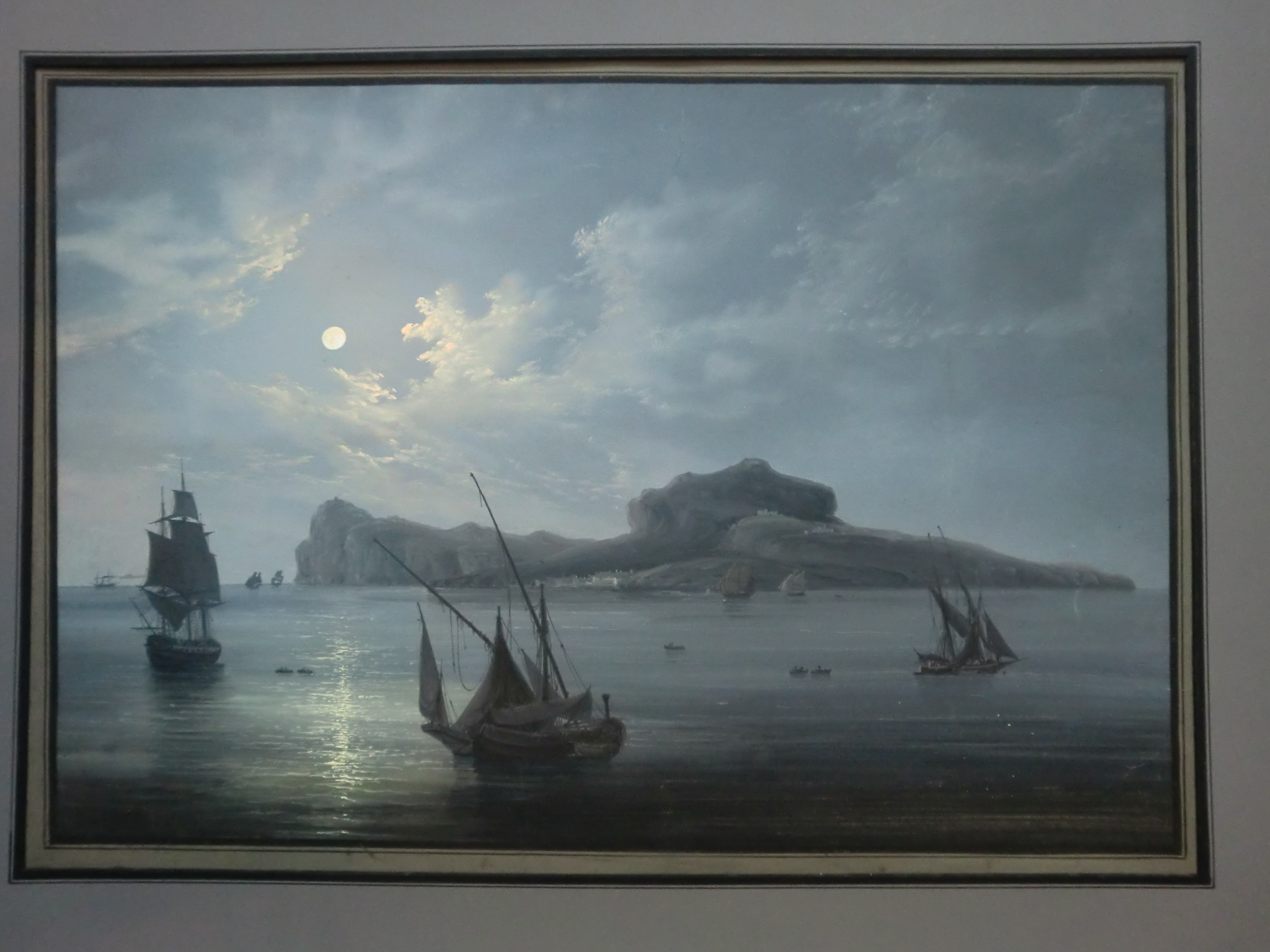 Veduta di capri al chiaro di luna